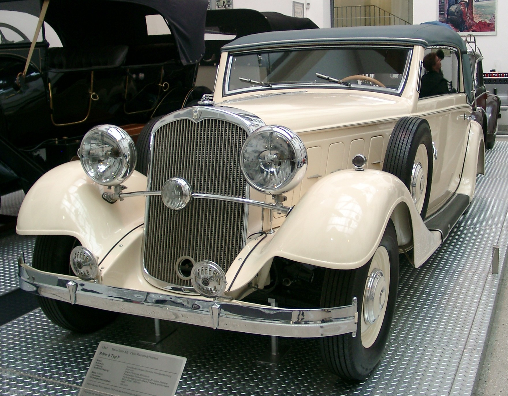 Röhr 8 Typ F, Baujahr 1933. Fotografiert im Verkehrsmuseum Dresden